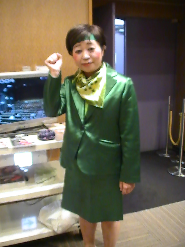 八幡カオル (2017年7月8日)